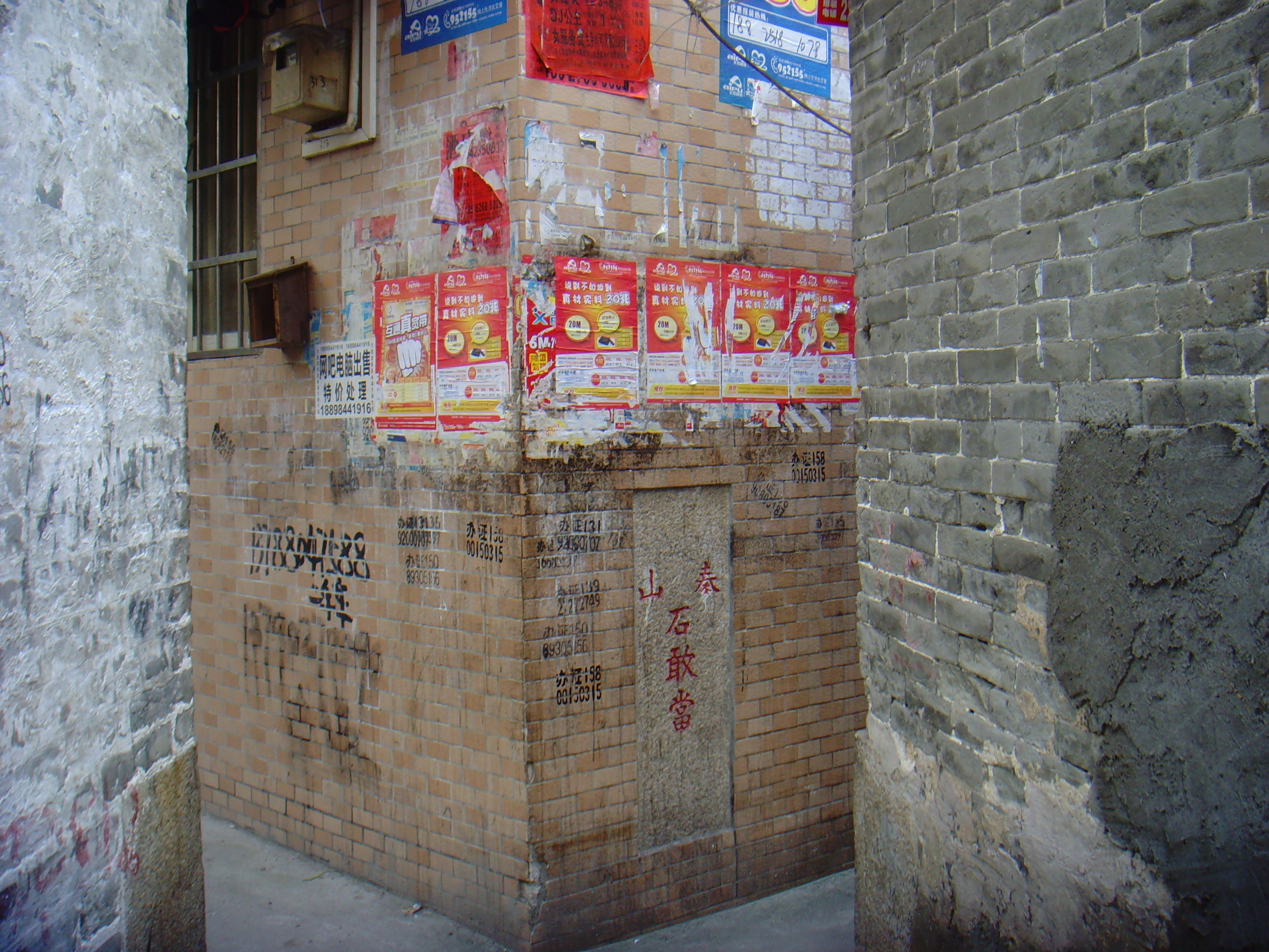 中文（香港）: 鑲嵌于新房外墻的泰山石敢當。